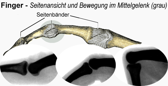 Bewegung im PIG (deutsch)